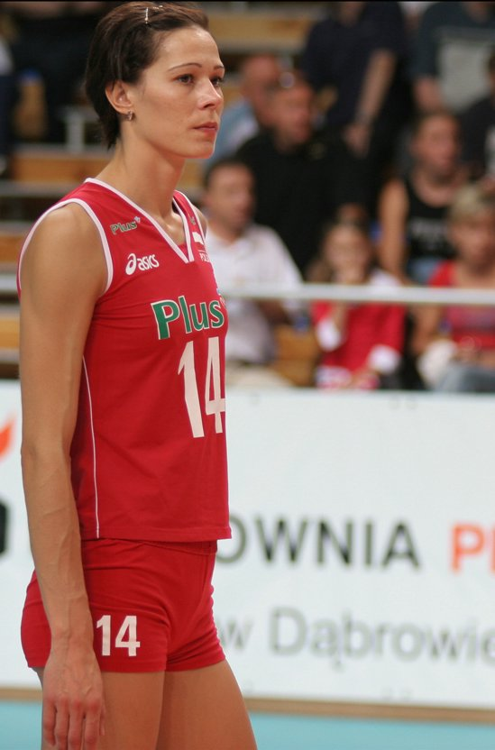 Maria Liktoras - siatkarka reprezentacji Polski